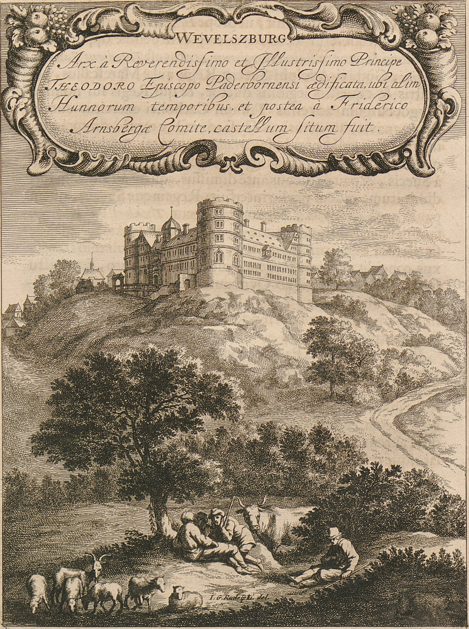 Wewelsburg um 1670